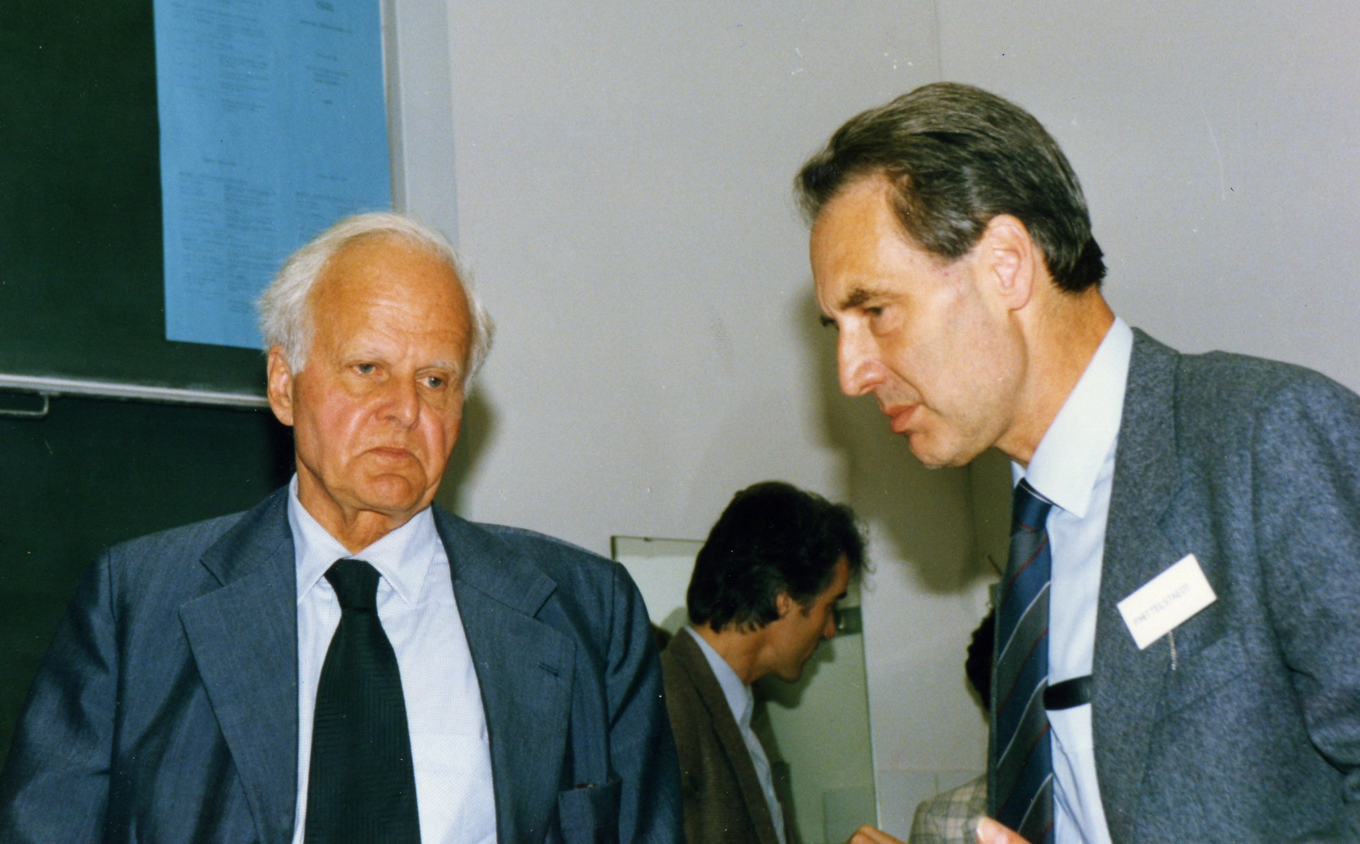 Peter Mittelstädt (r.) und Carl Friedrich von Weizsäcker (l.), Köln 1984